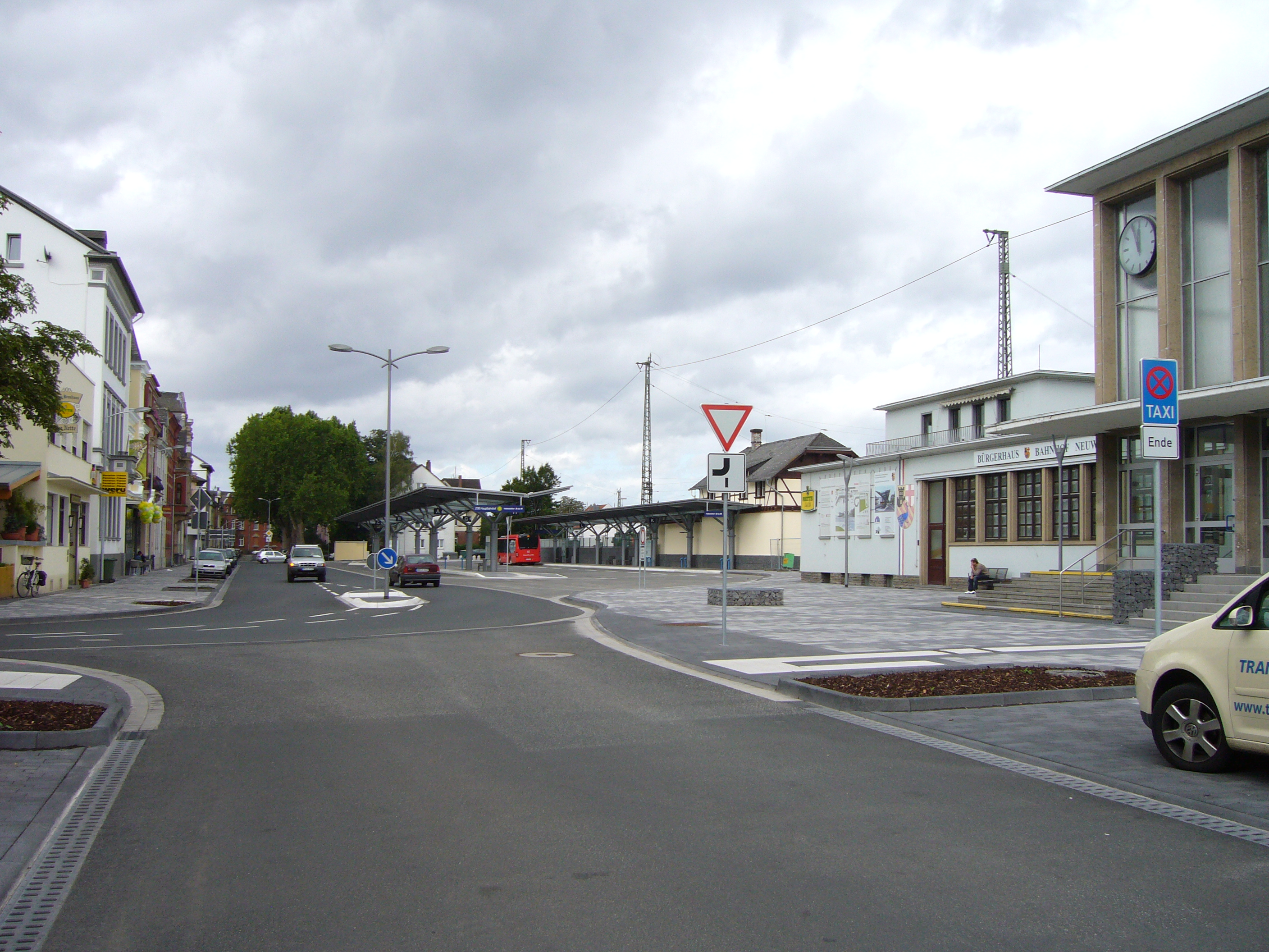 Busbahnhof Neuwied